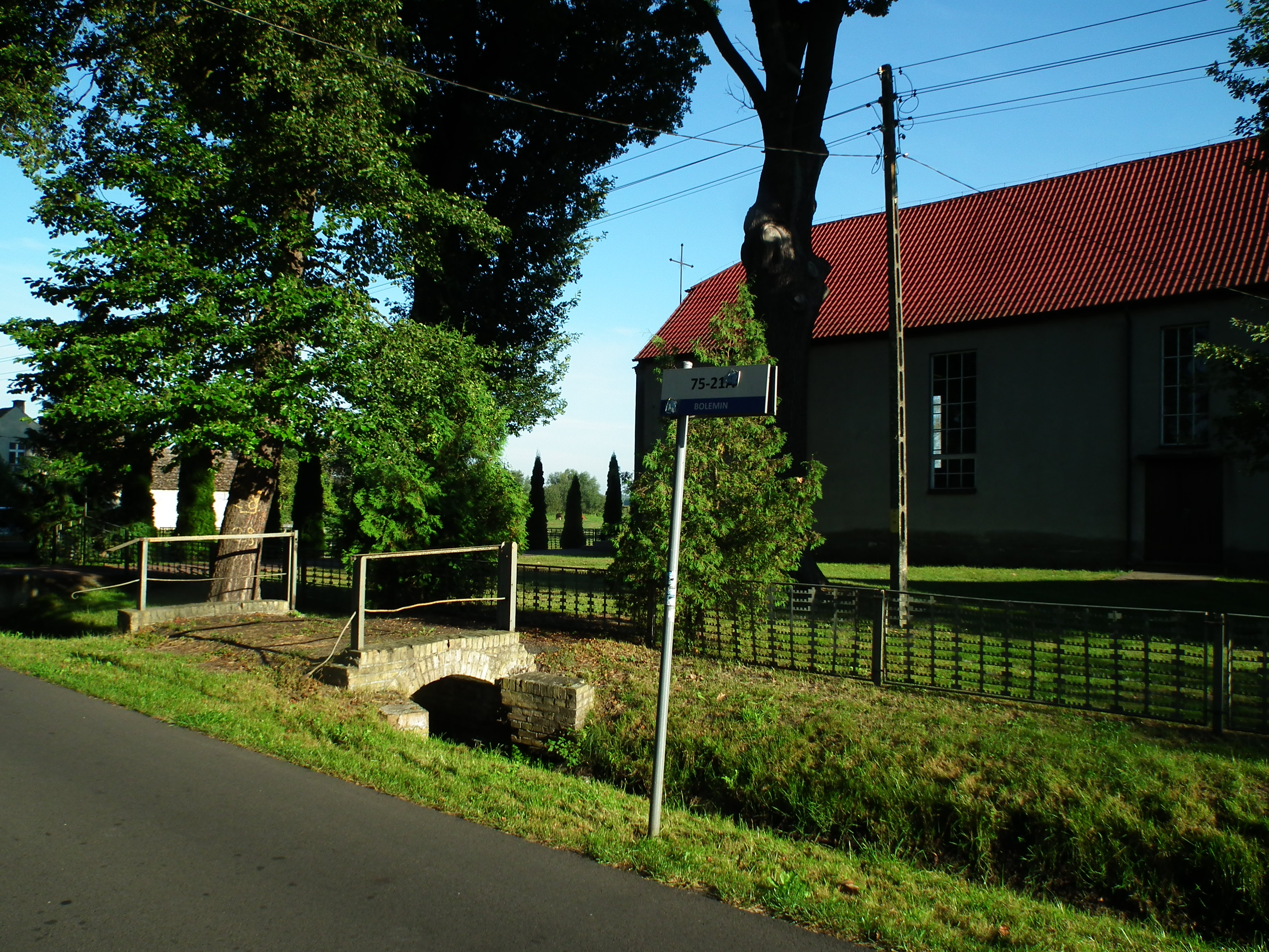 Kościół św. Apostołów Piotra i Pawła w Boleminie.